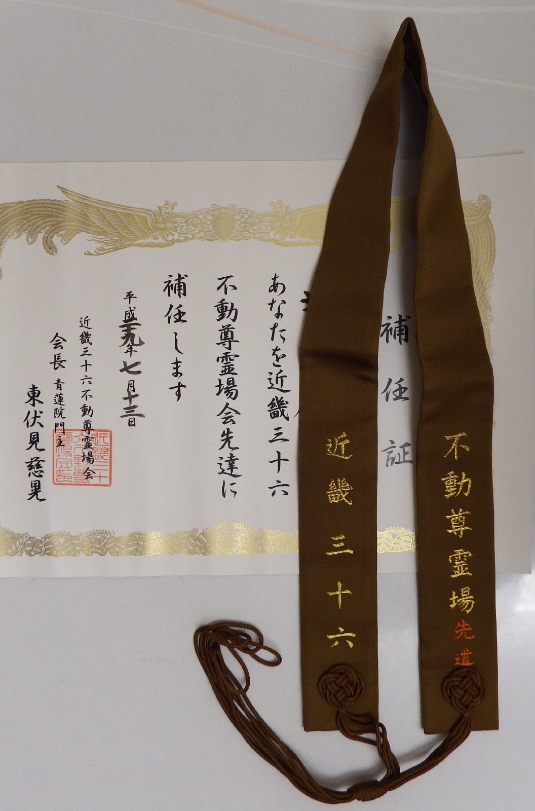 近畿三十六不動尊霊場の補任証と袈裟